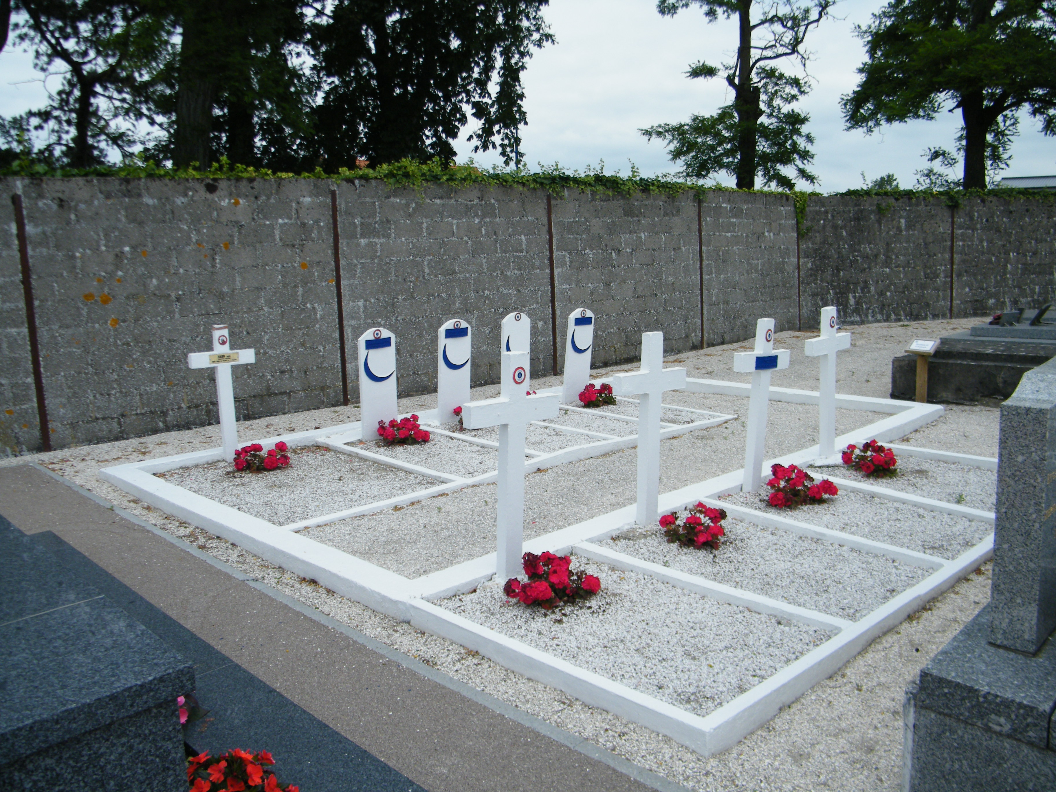 Carré militaire -musulmans, inconnus - cimetière - Le Crotoy